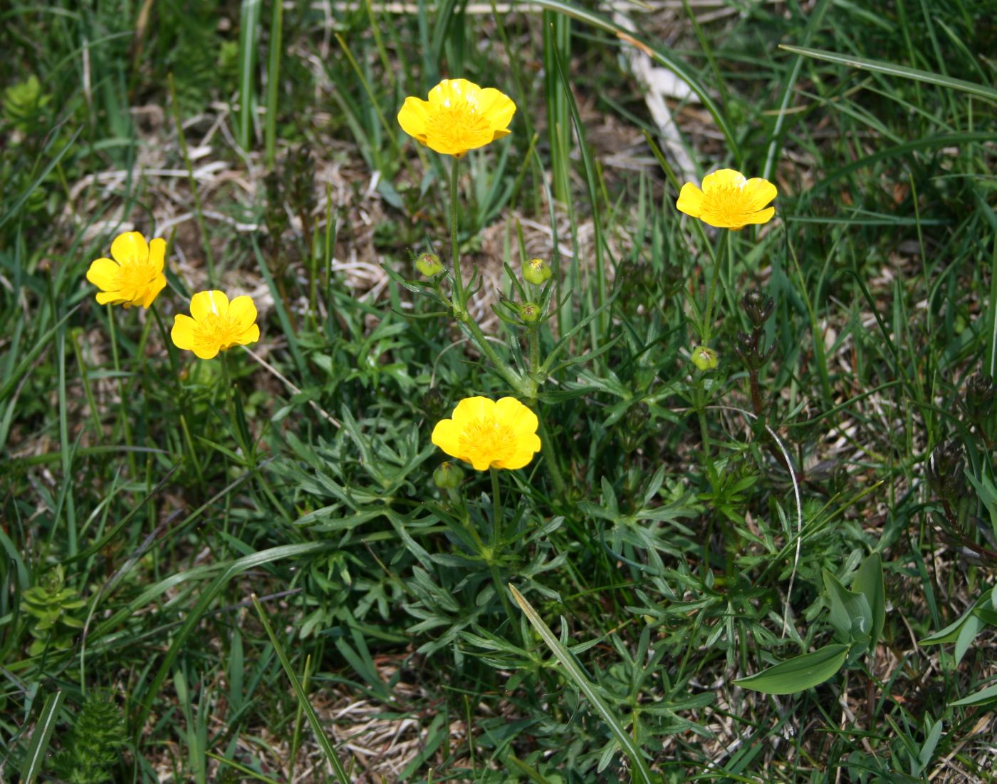 Ranunculus carinthiacus, Hahnenfußgewächse (Ranunculaceae) - Slowenien/Slovenija/Slovenia: Trnovski gozd, Kucelj